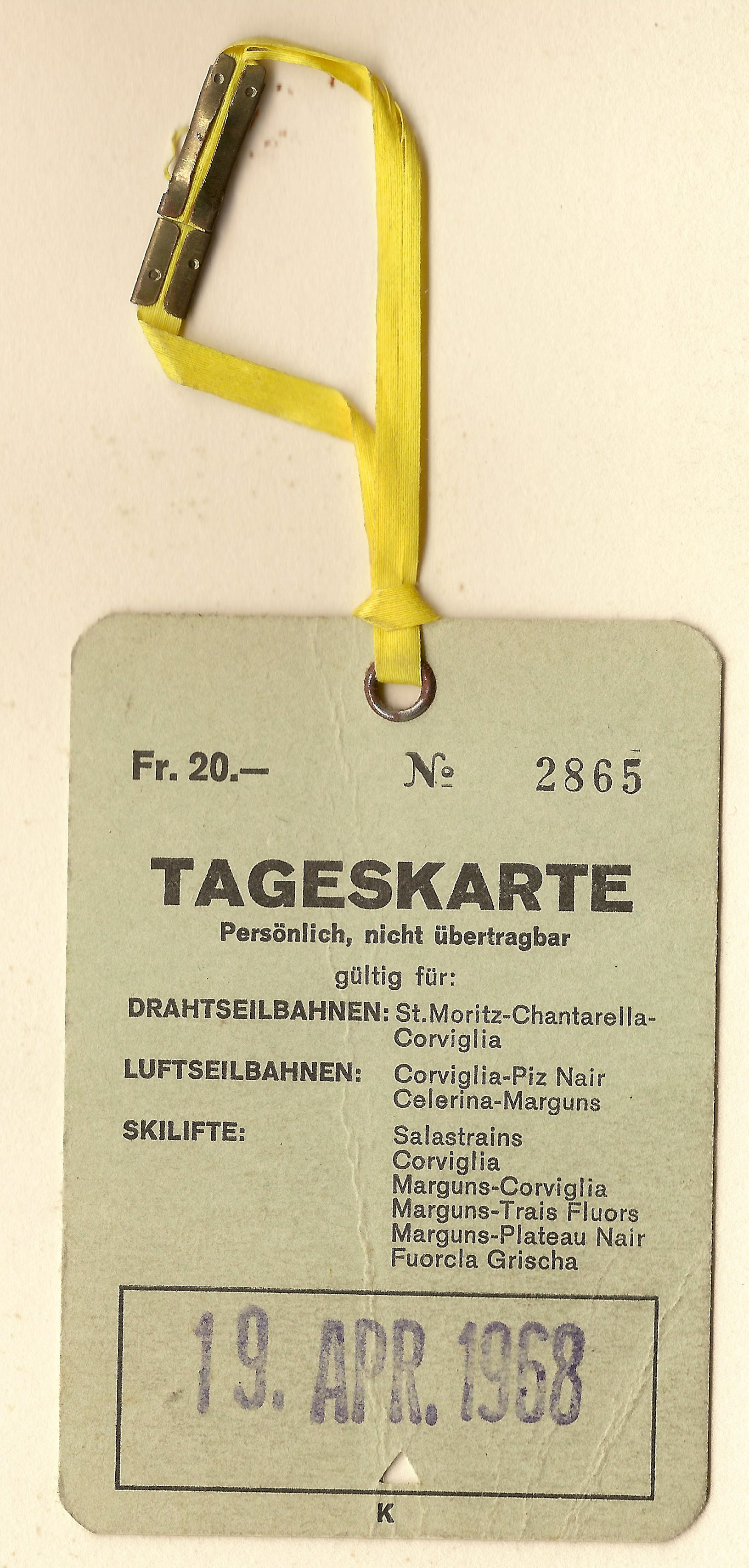 Switzerland